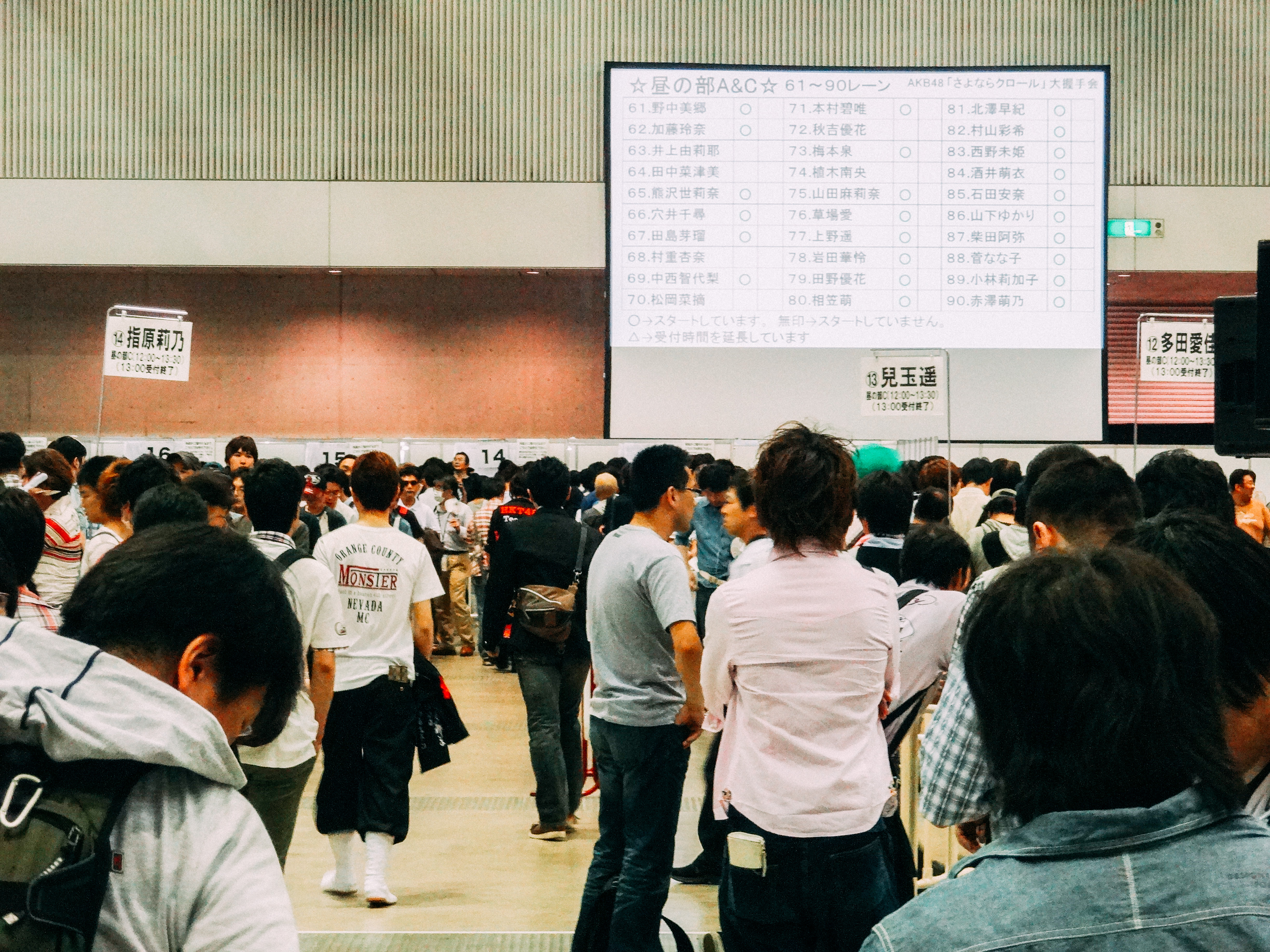 AKB48 劇場盤発売記念大握手会